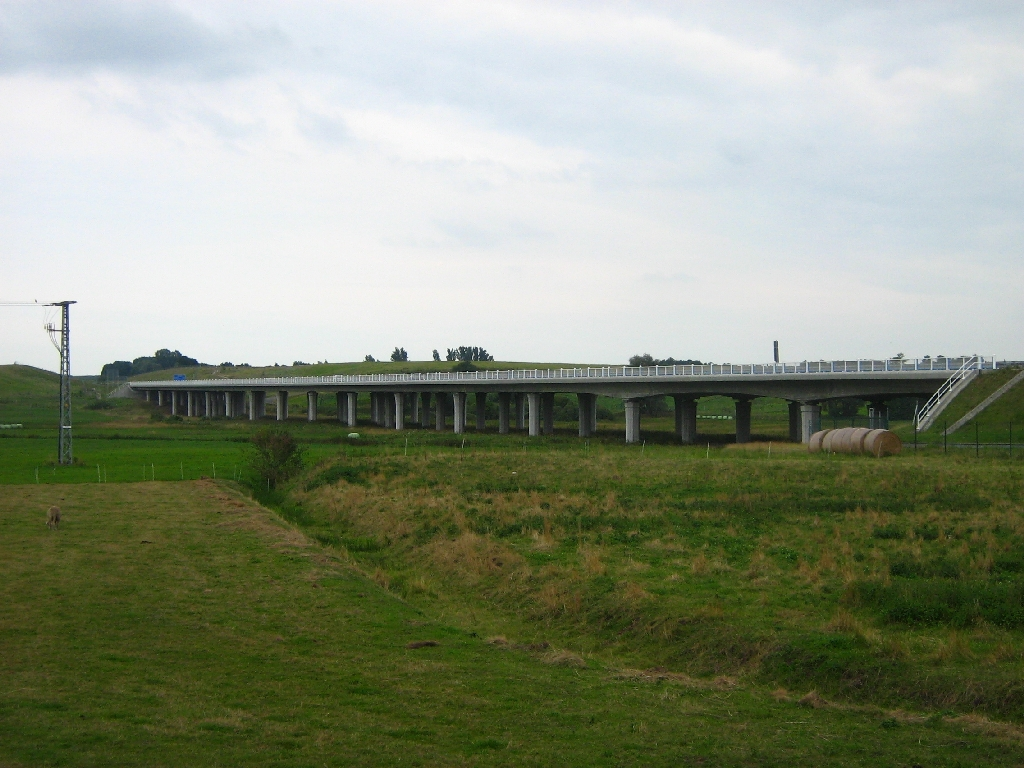 Talbrücke der Bundesautobahn A20 über den Großen Landgraben (Landkreis Demmin, Mecklenburg-Vorpommern)